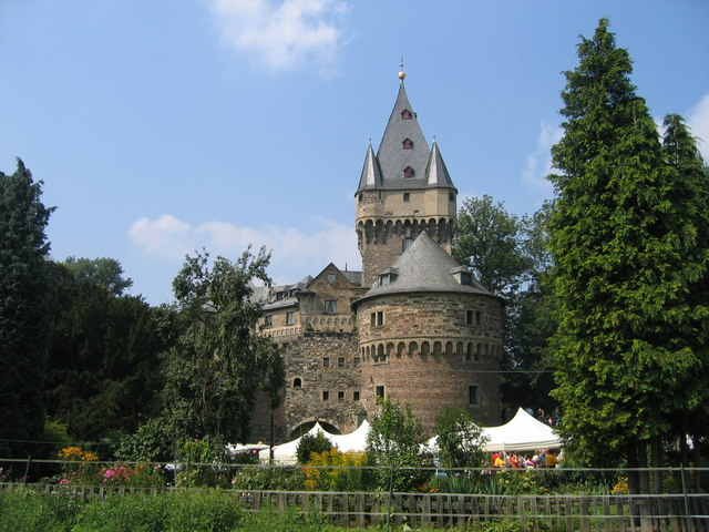 Schloss Hülchrath in Grevenbroich, Ostansicht